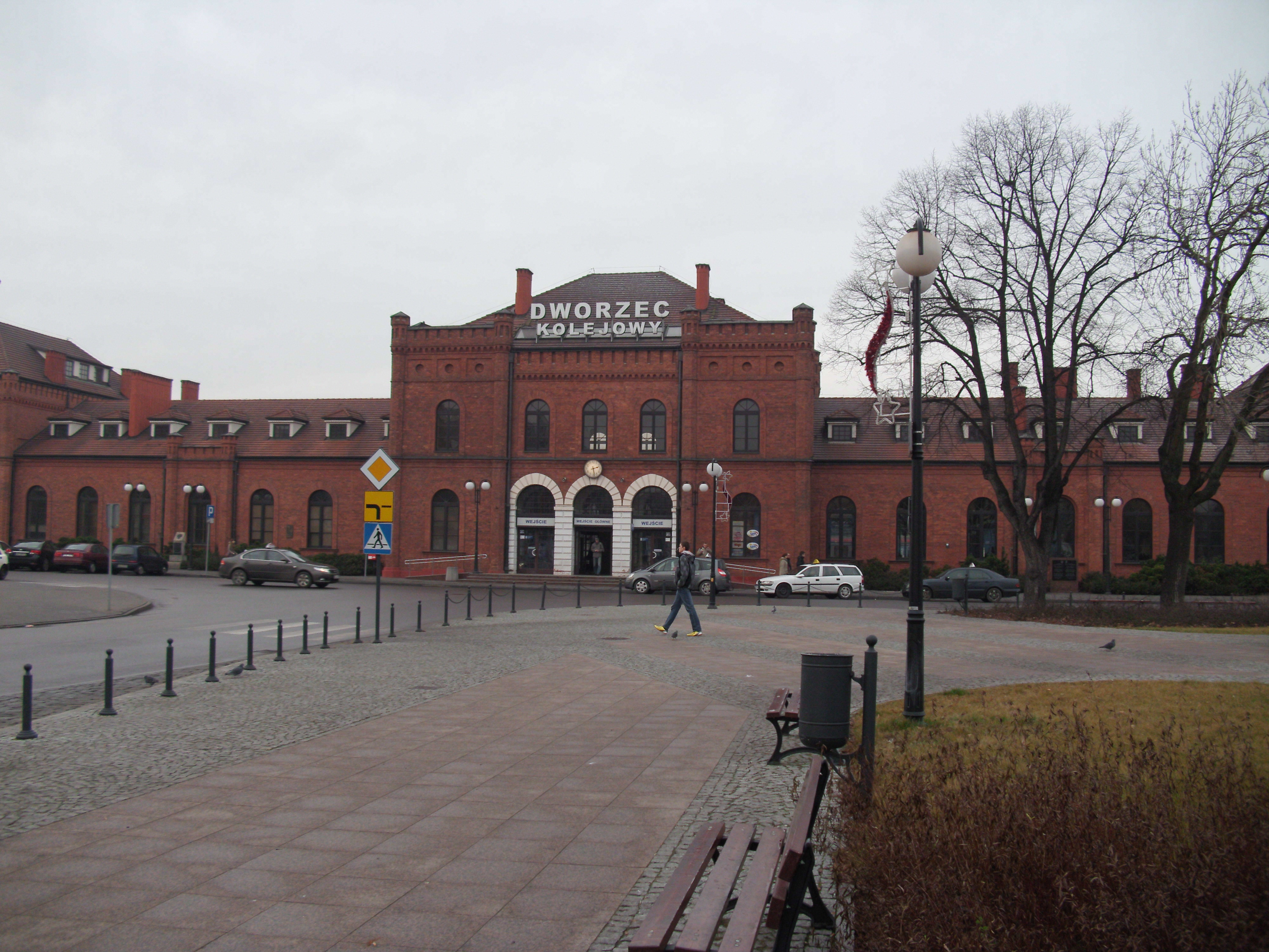 Dworzec w Skierniewicach